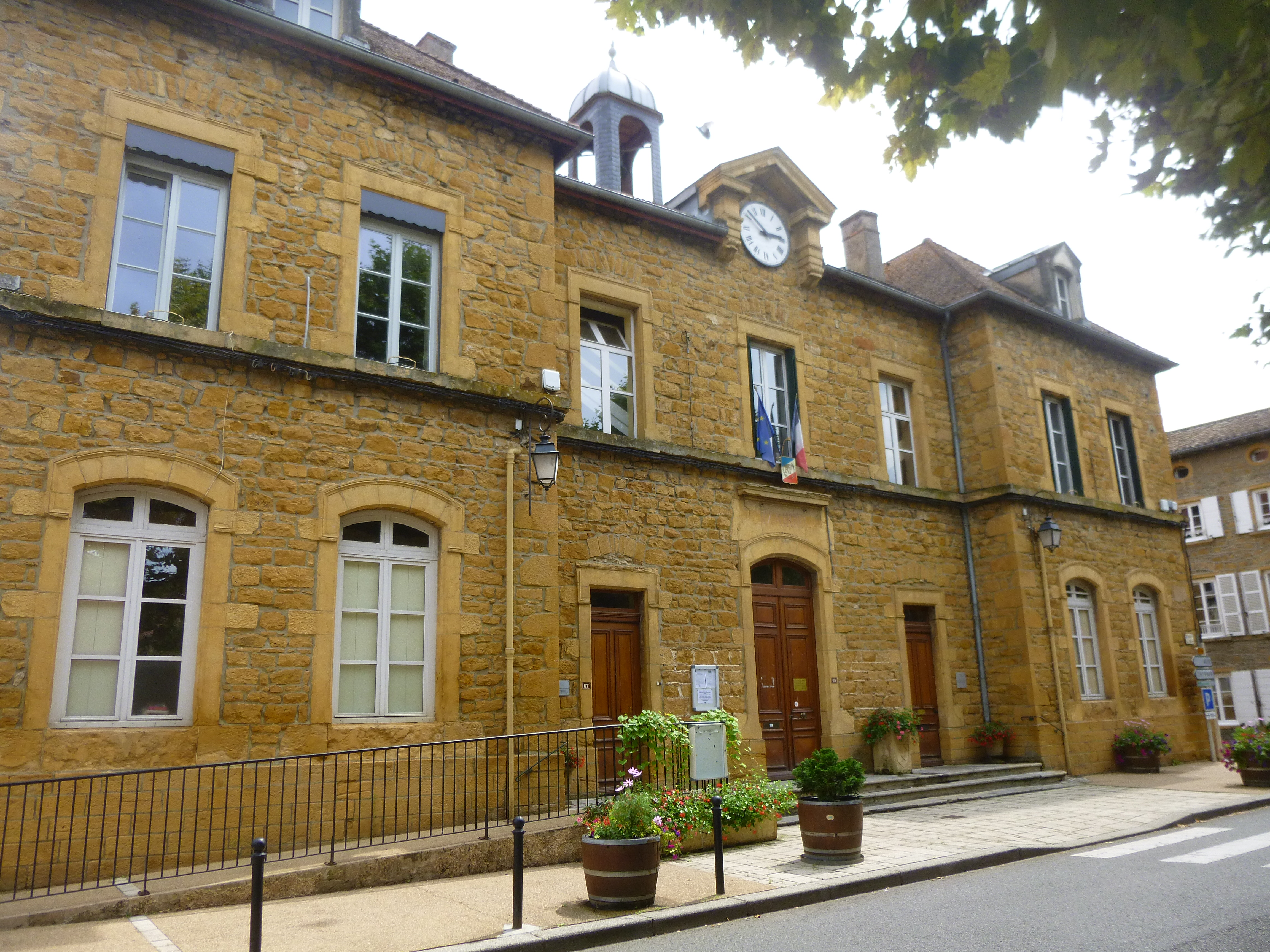 Façade de la mairie